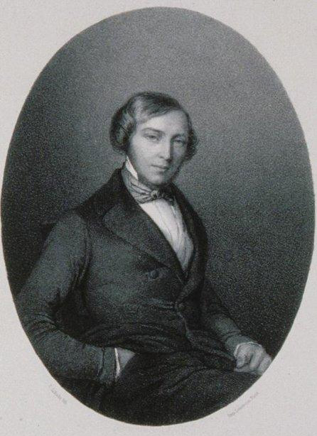 Christian Batholmèss. Membre correspondant de l'Institut, professeur de philosophie. 1850. Bibliothèque nationale et universitaire de Strasbourg